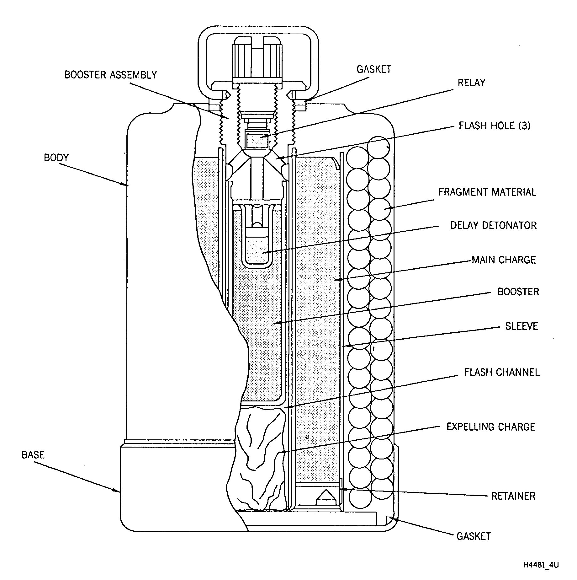 Bułgarska mina przeciwpiechotna PSM-1